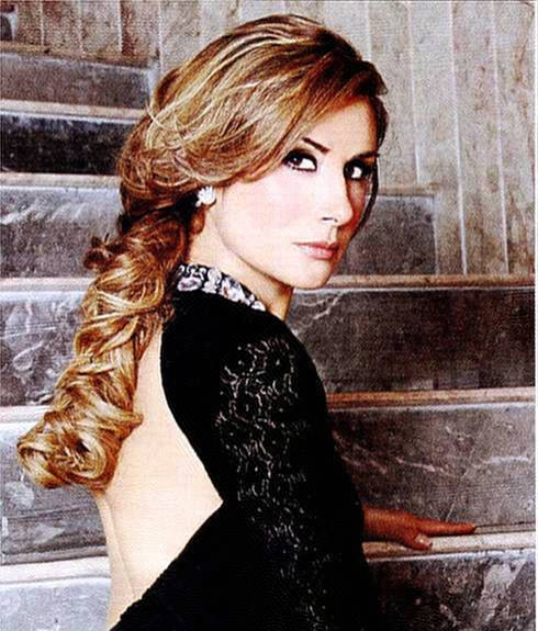 Nombre Completo: Julieta Ingrid Ramírez cabaña Roselind